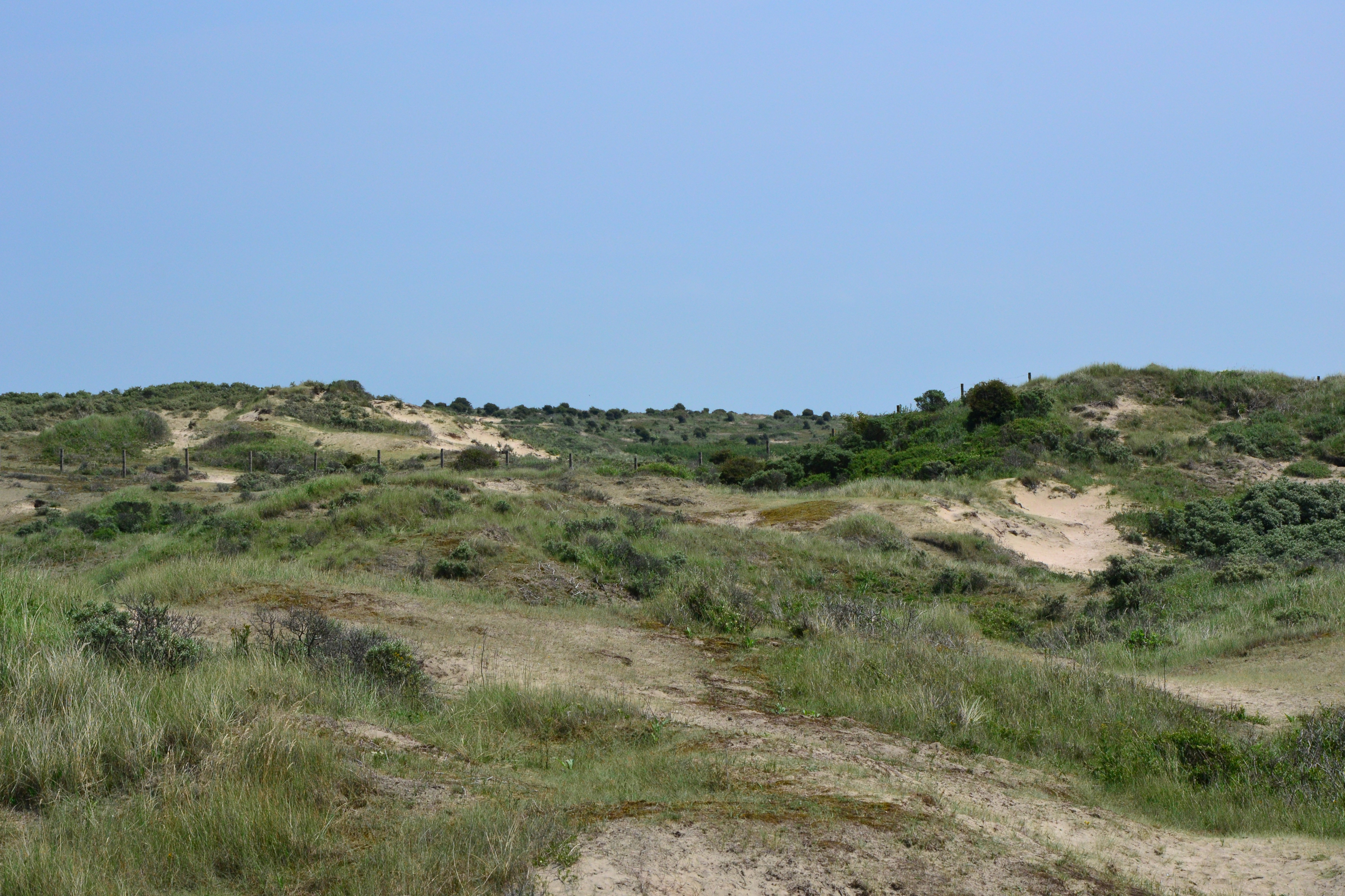 Zicht op een deel van het natuurgebied de Amsterdamse Waterleidingduinen, gelegen nabij Noordwijk